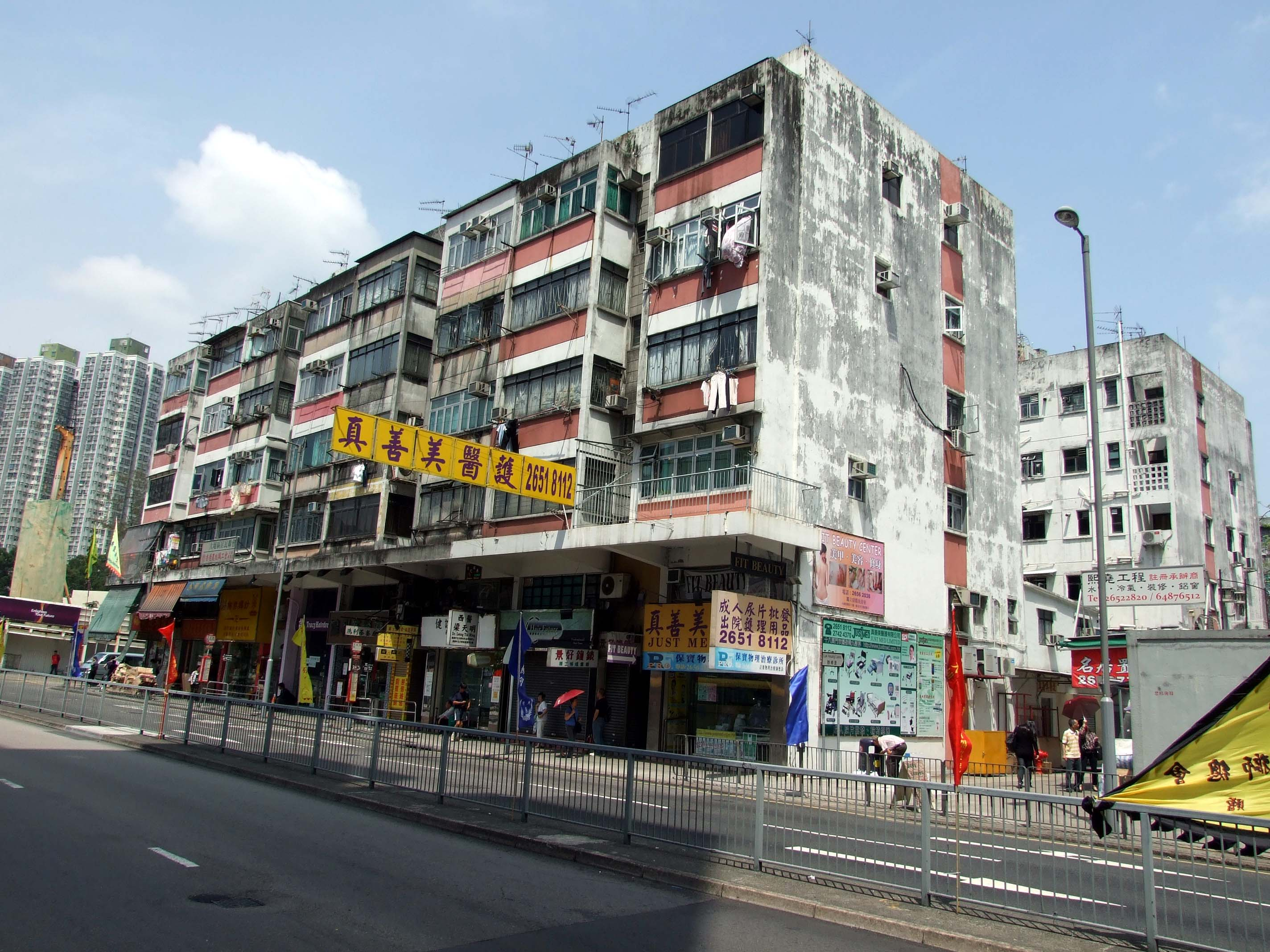 六鄉新村典型下鋪上居的四層樓宇